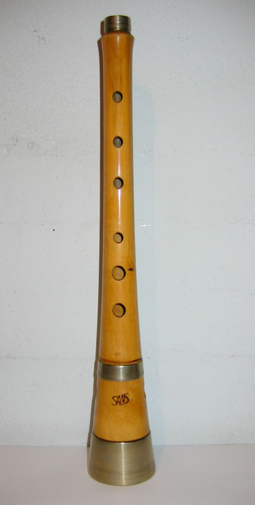 Gralla construïda per el Luthier Cesc Sans